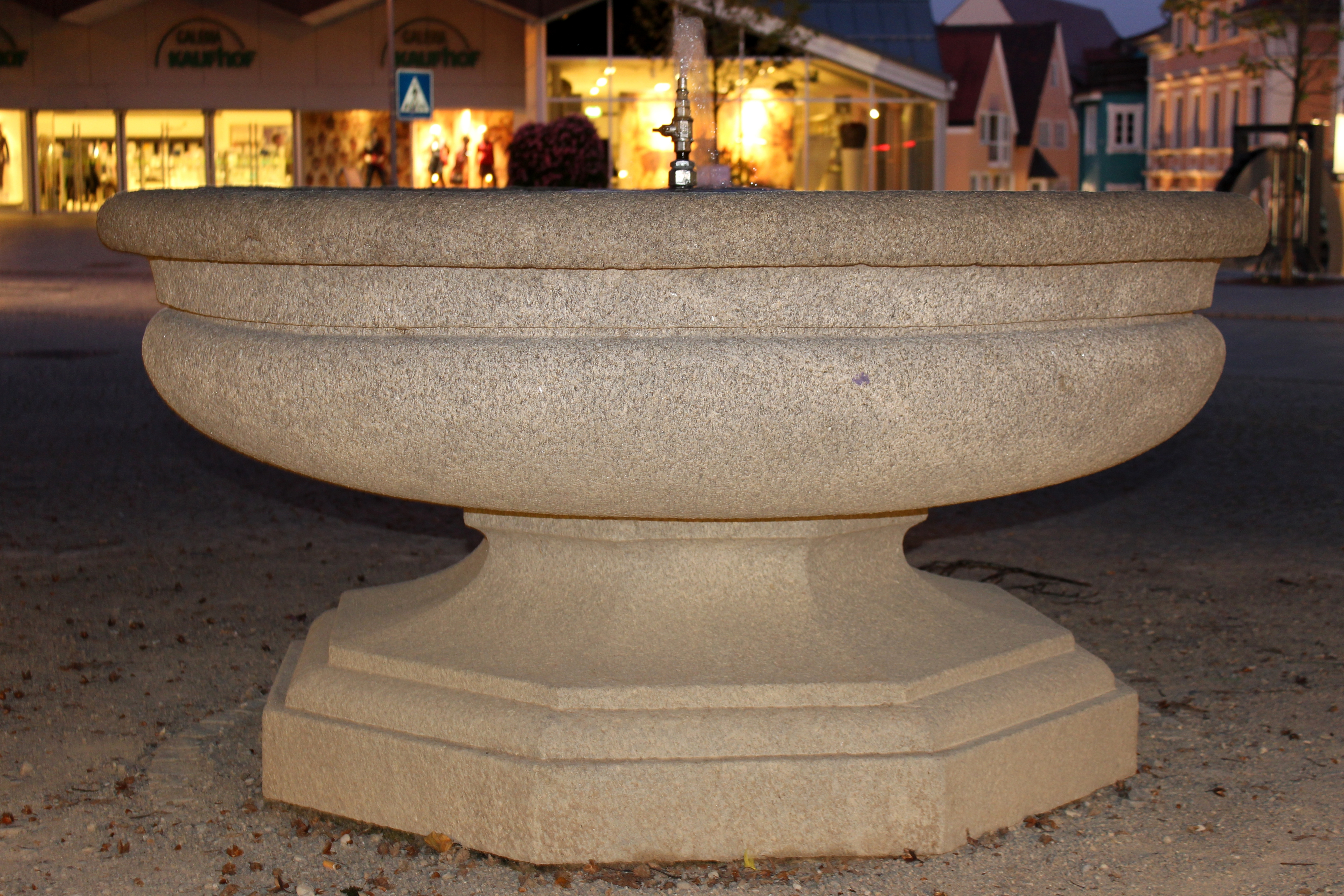 Brunnen zur Erinnerung an die Hexenprozesse der Maria Anna Schwegelin